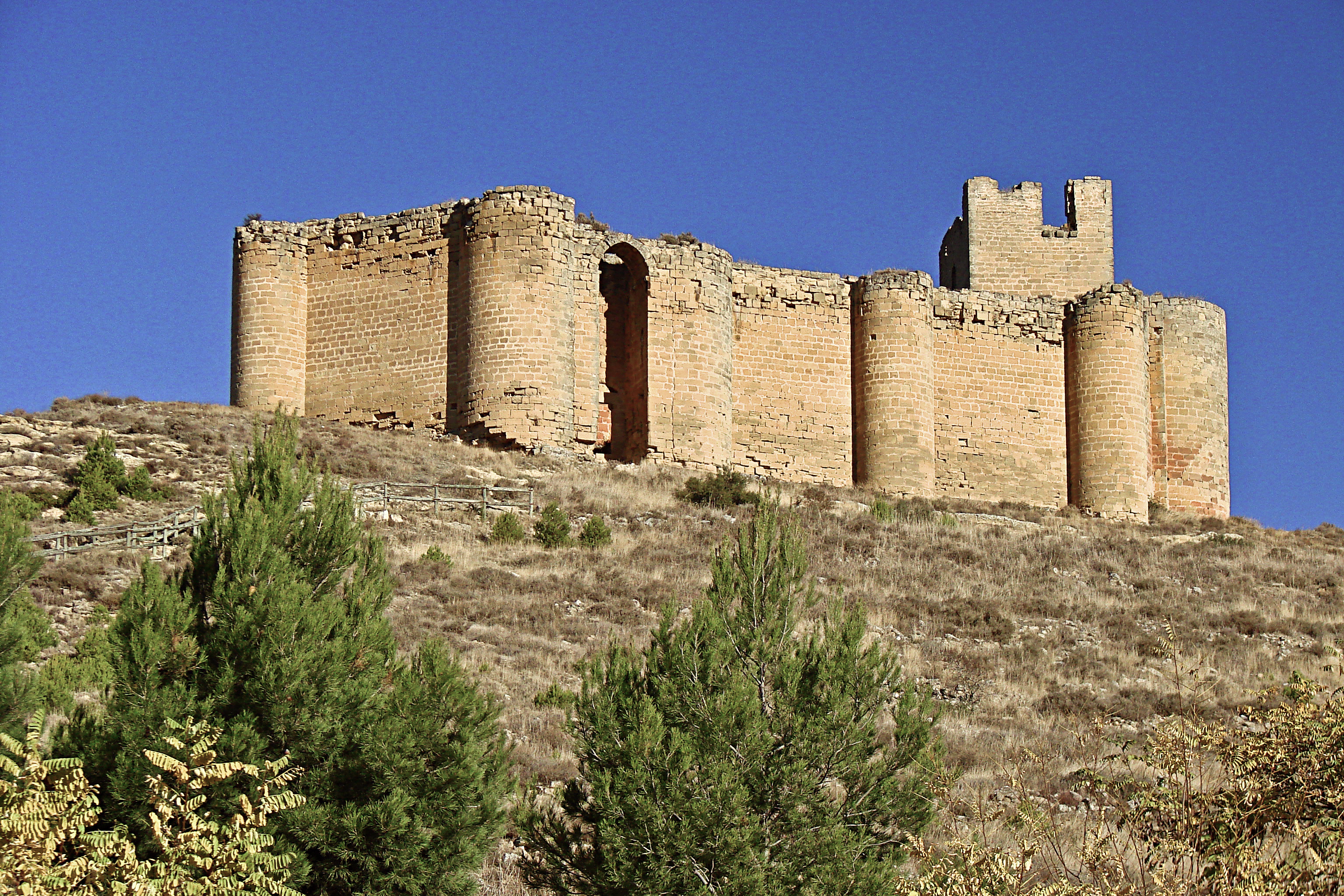 Castillo de Davalillo en la localidad de San Asensio, La Rioja - España